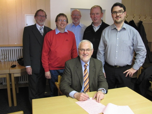 Aus dem Vorstand der FWG Rheinland-Pfalz gebildete Vorgründungsgesellschaft für die Gründung der FREIEN WÄHLER Rheinland-Pfalz am 13. März 2010 in Emmelshausen. Im Vordergrund FWG-Landesvorsitzender Manfred Petry. Stehend von links nach rechts: Joachim Albert (Wahlbezirk 1), Claus Ableiter (Wahlbezirk 3), Reinhold Niederprüm (Wahlbezirk 2), Günther Mack (FWG-Schriftführer), Marc Weigel (Wahlbezirk 4).